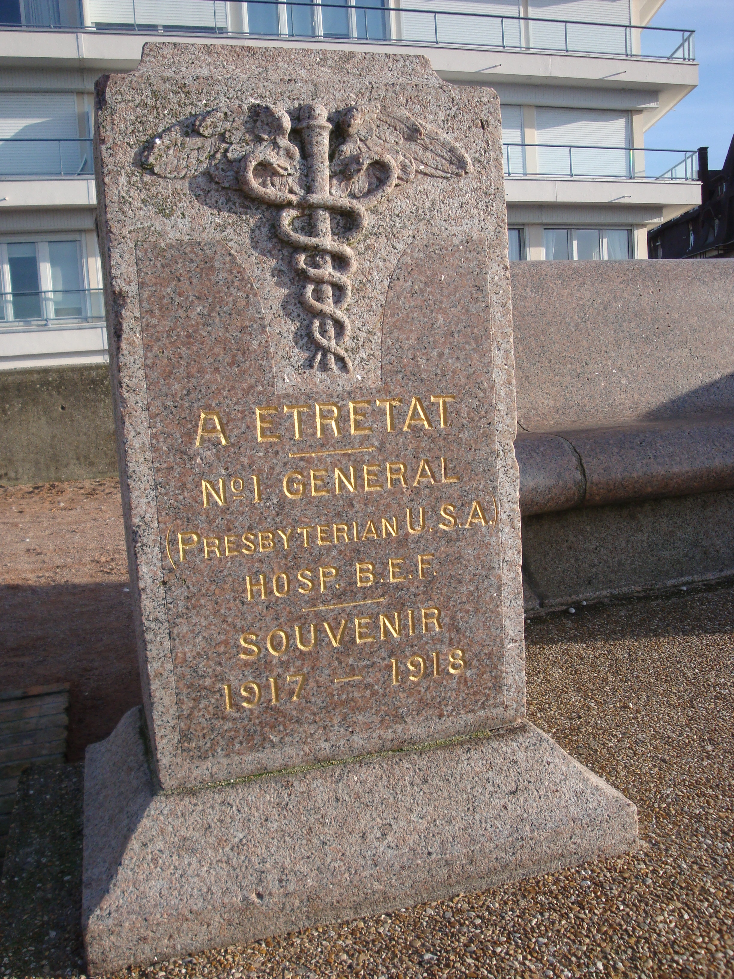 Etretat - Devant la mer, le banc de granit en hommage à l'hôpital militaire de 1917-1918